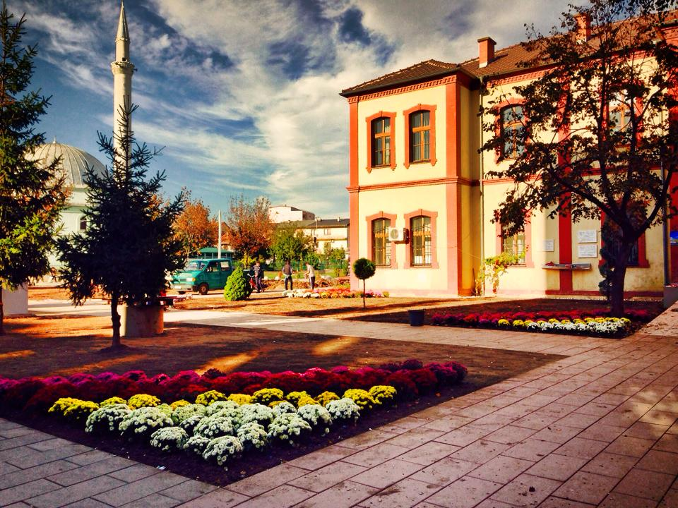 Biblioteka e qytetit te Ferizaj-t